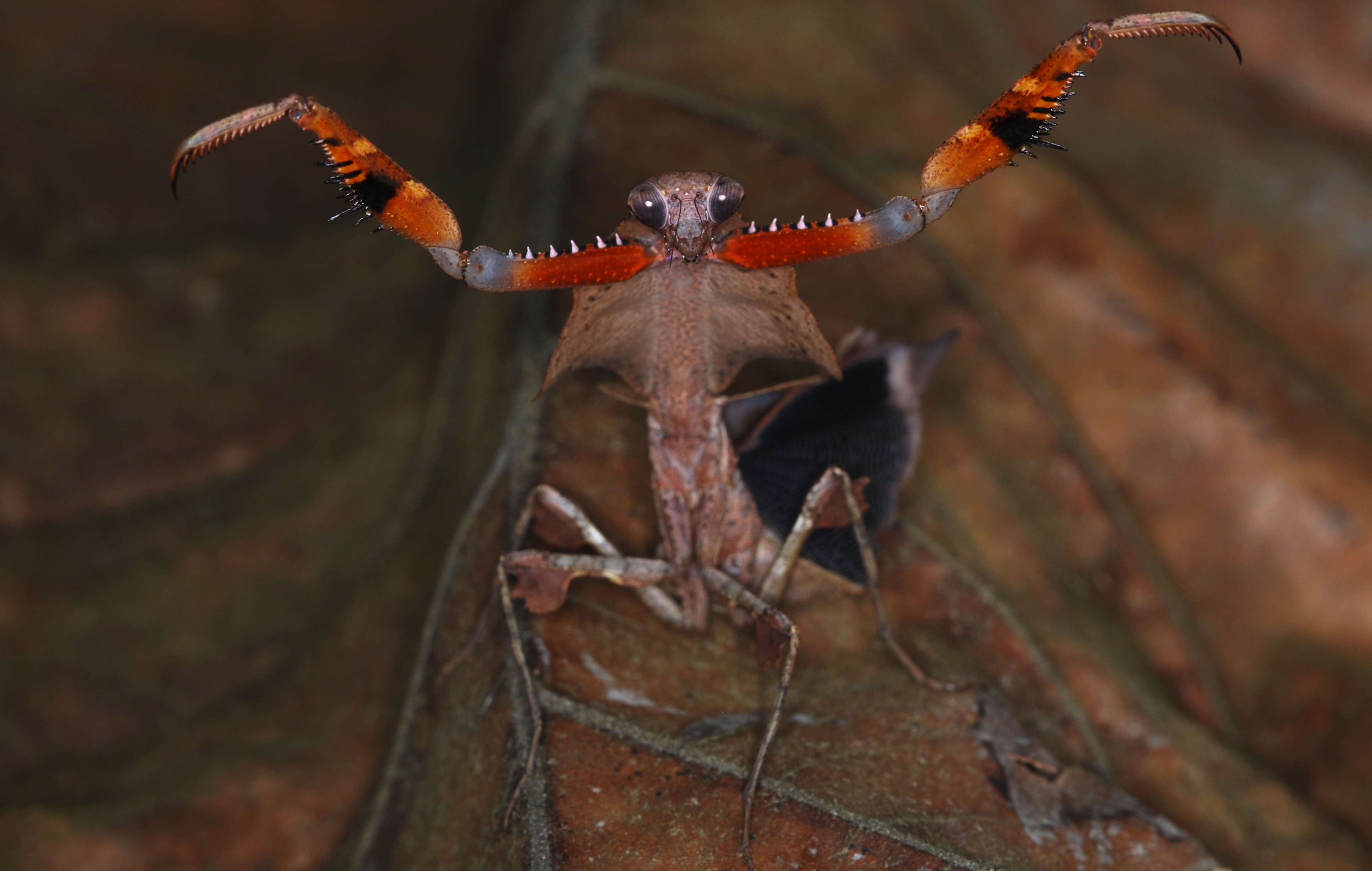 Tapah Hills, Perak, MALAYSIA